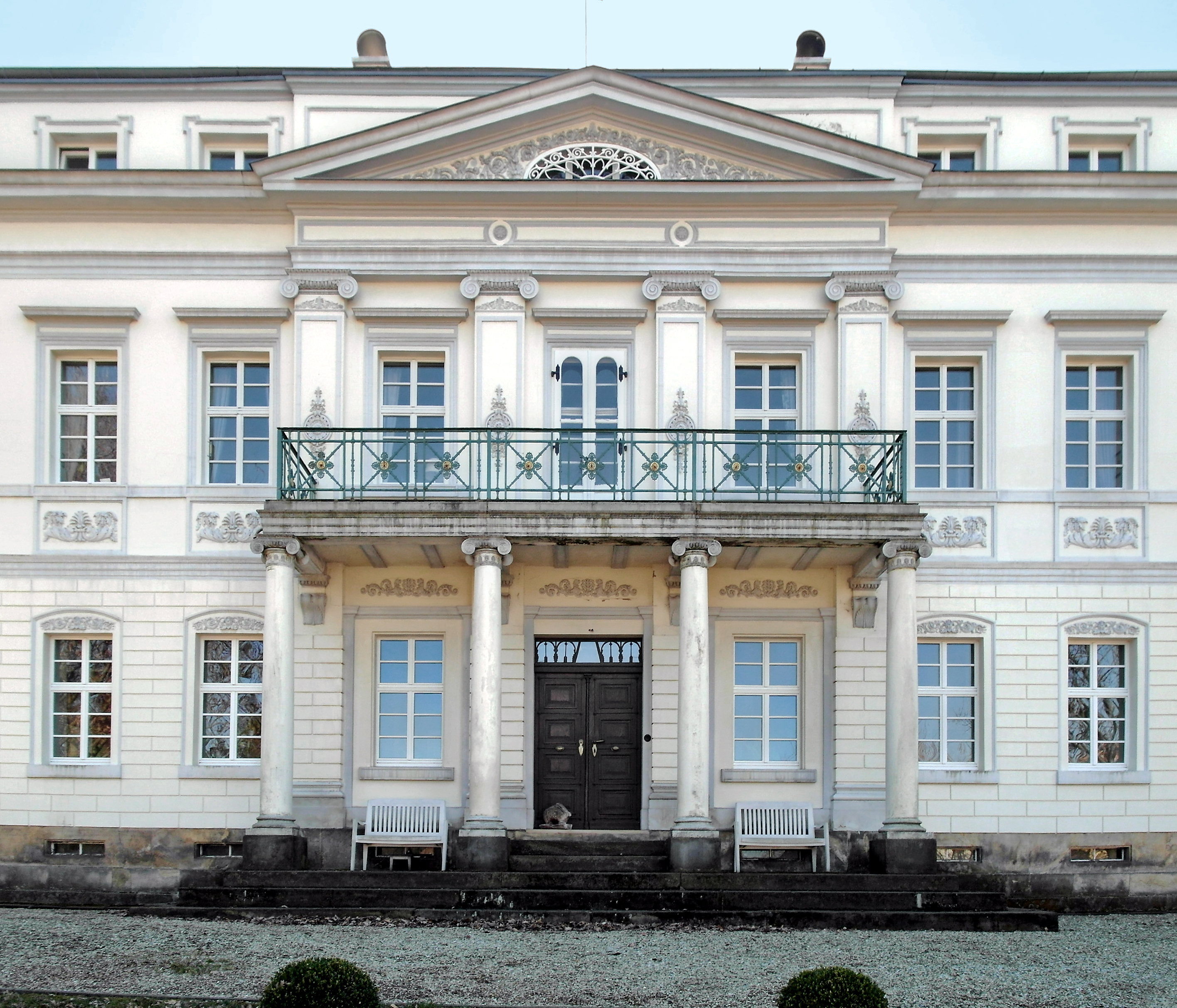 27.03.2017 02799 Großschönau, Hauptstraße 52: Rittergut Großschönau. Klassizistisches Herrenhaus, 1834 für Johann Gottfried Haebler errichtet. Privatbesitz. Nordseite. [SAM8977.JPG]20170327390DR.JPG(c)Blobelt